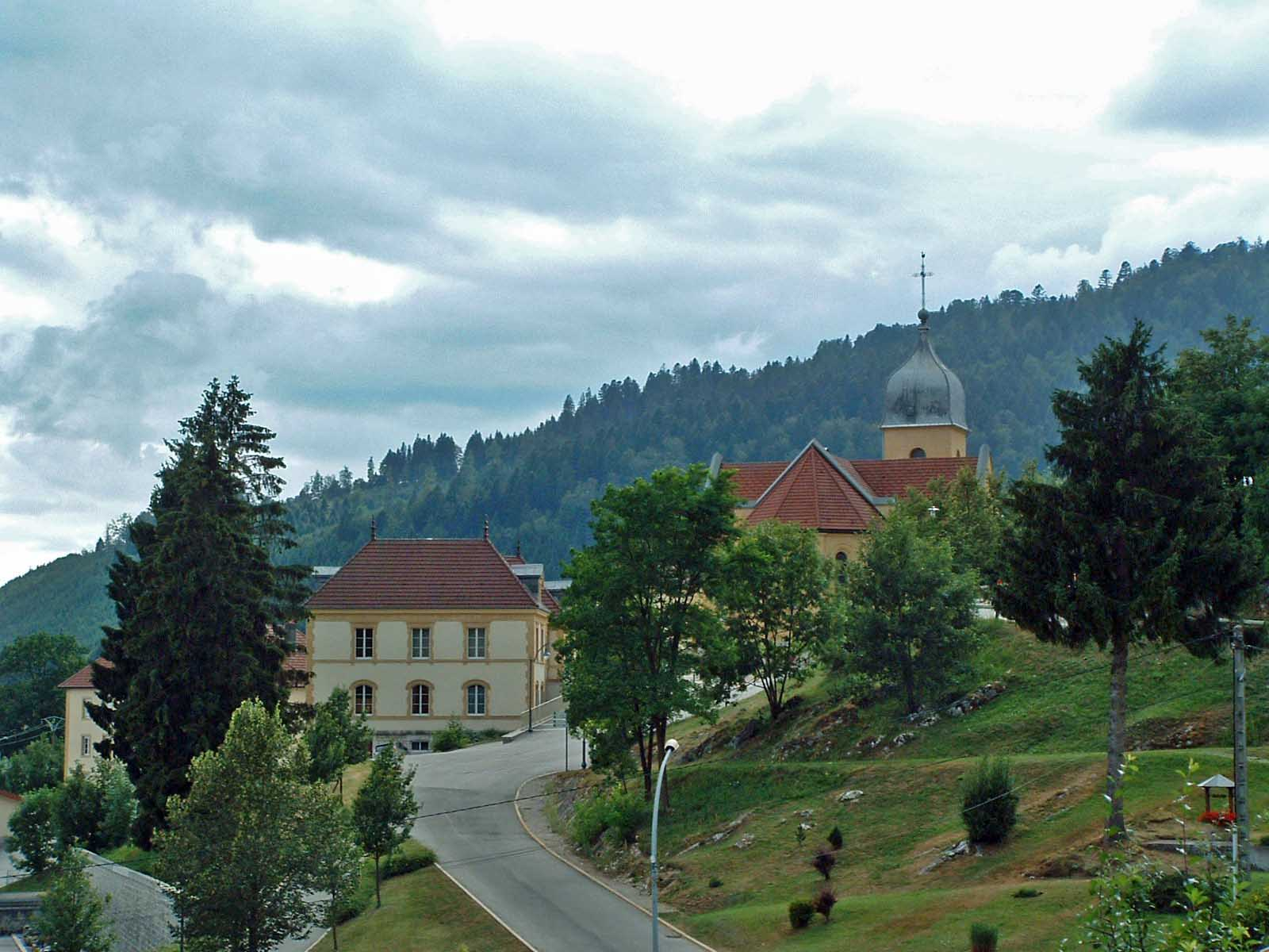 Vue sur la mairie et l'église de la ville des Fins, Doubs, France